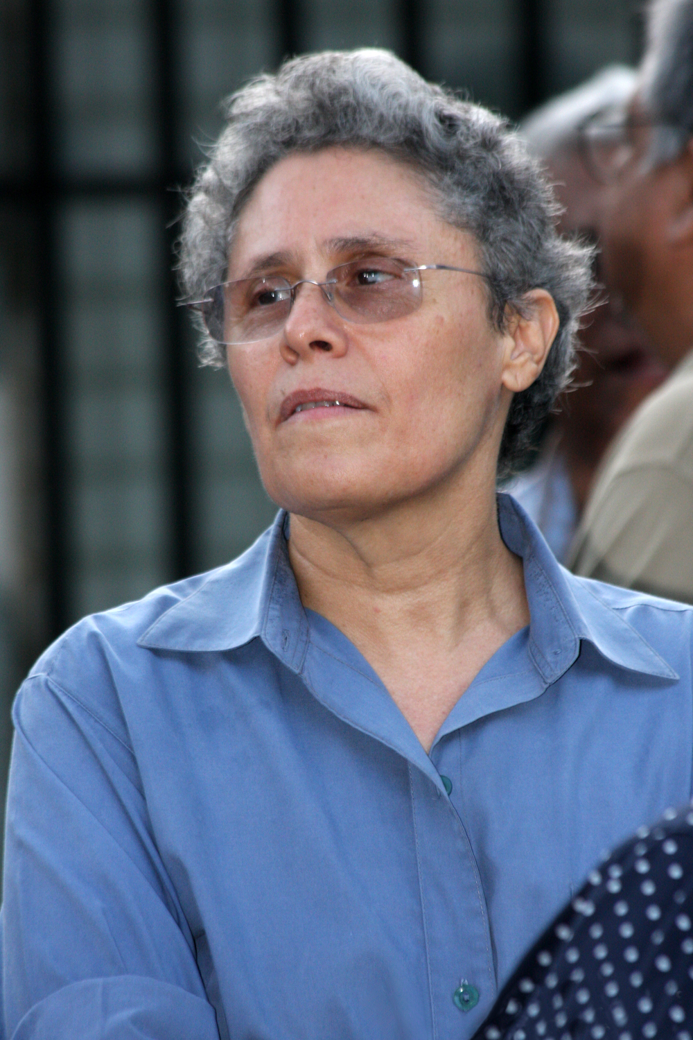 Dora María Tellez